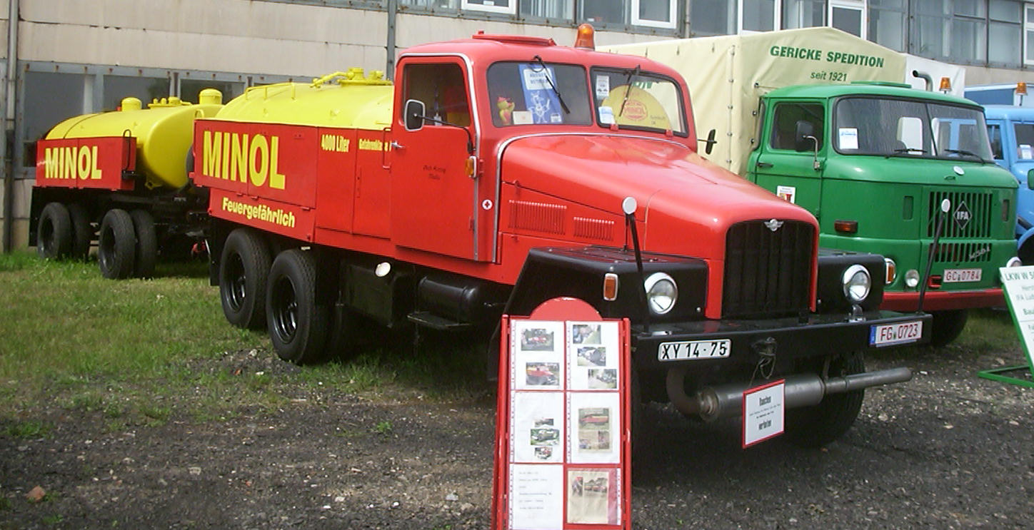 IFA G5-II als Tankwagen (4000 l) mit Tankanhänger (4500 l), jeweils in der Zivilausführung für die Tankstellenkette Minol. Dahinter ist ein IFA W50 L als Pritsche mit Plane zu sehen.